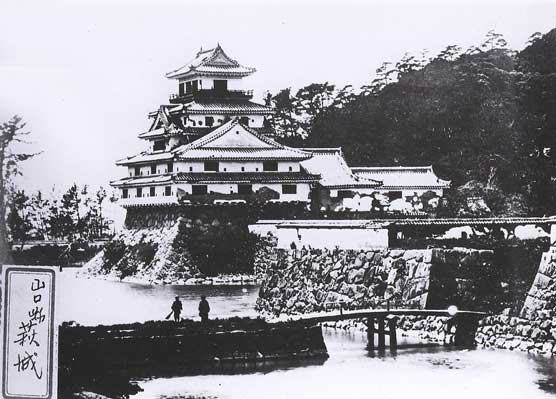 明治時代に撮影された天守（非現存）